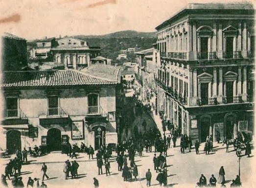 Vista dal Comune dall'alto di C.so Vitt. Emanuele con vista del tetto della locanda Santa Croce a CL agli inizi 900